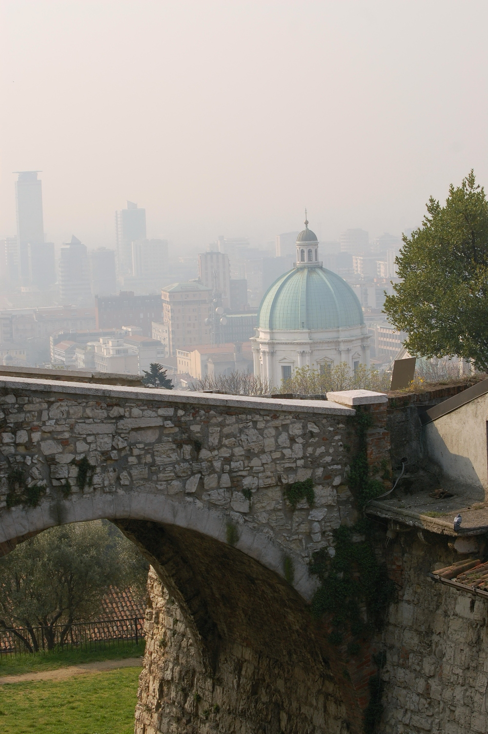 Castello Brescia